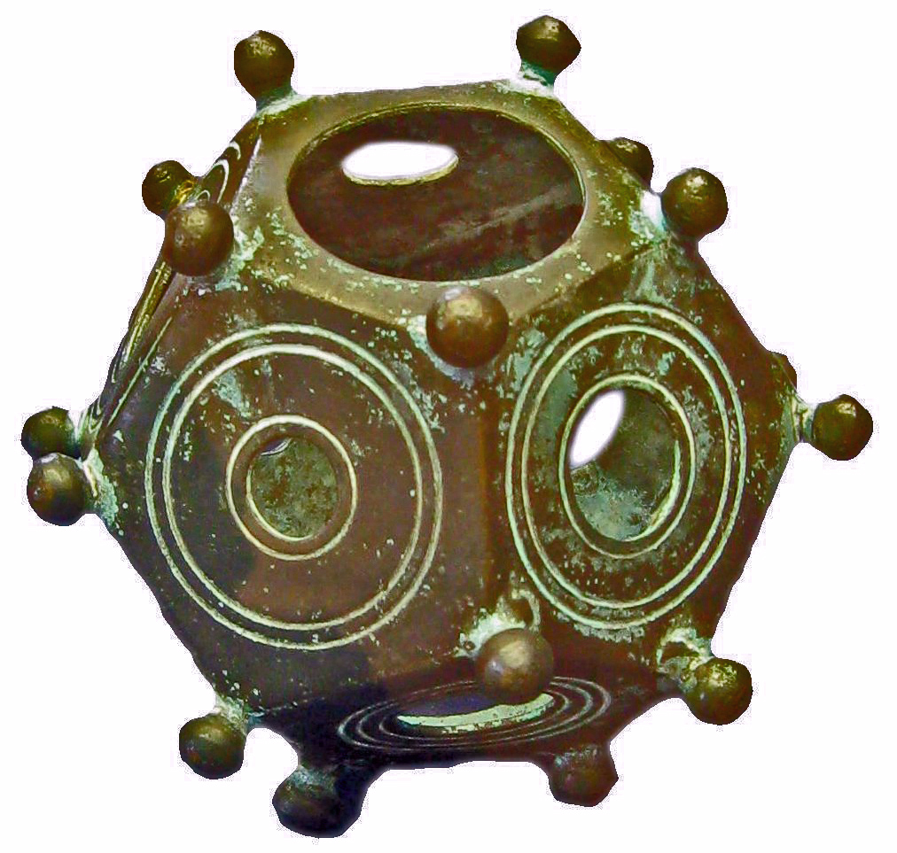 Römischer Pentagondodekaeder